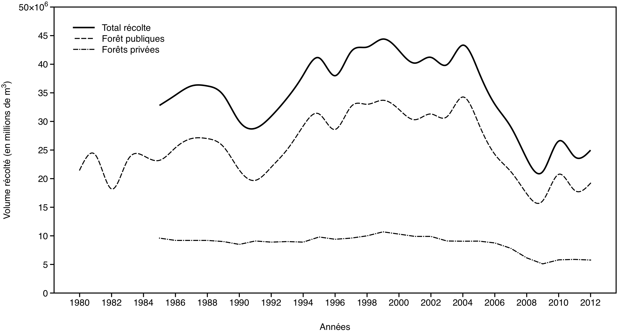 Volumes de bois (mètres cubes) récoltés au Québec entre les saisons de récolte 1980-1981 et 2012-2013 (Source des données: Ministère des Ressources naturelles).